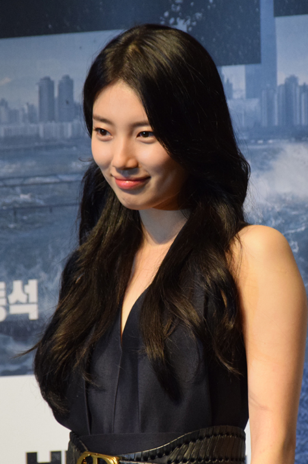 영화 '백두산' Mount Paektu 제작보고회 현장 (2019.11.19)